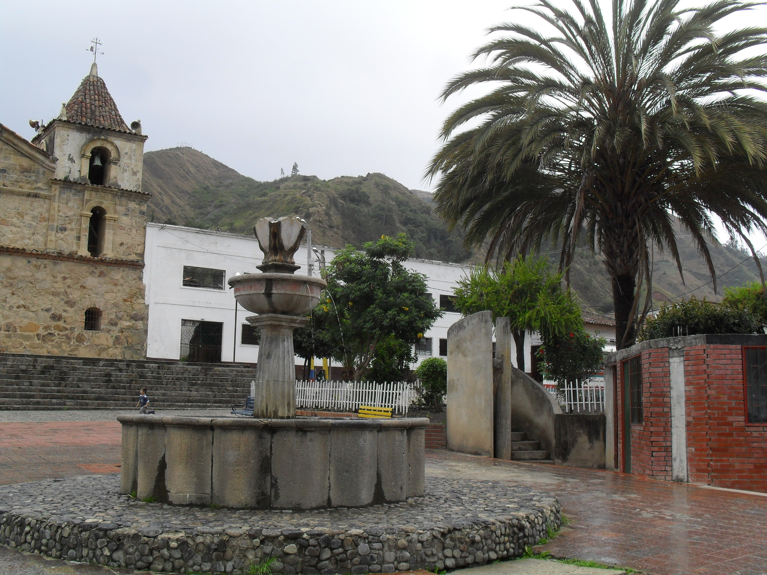 Parque principal del municipio de Chiscas, departamento de Boyacá, Colombia